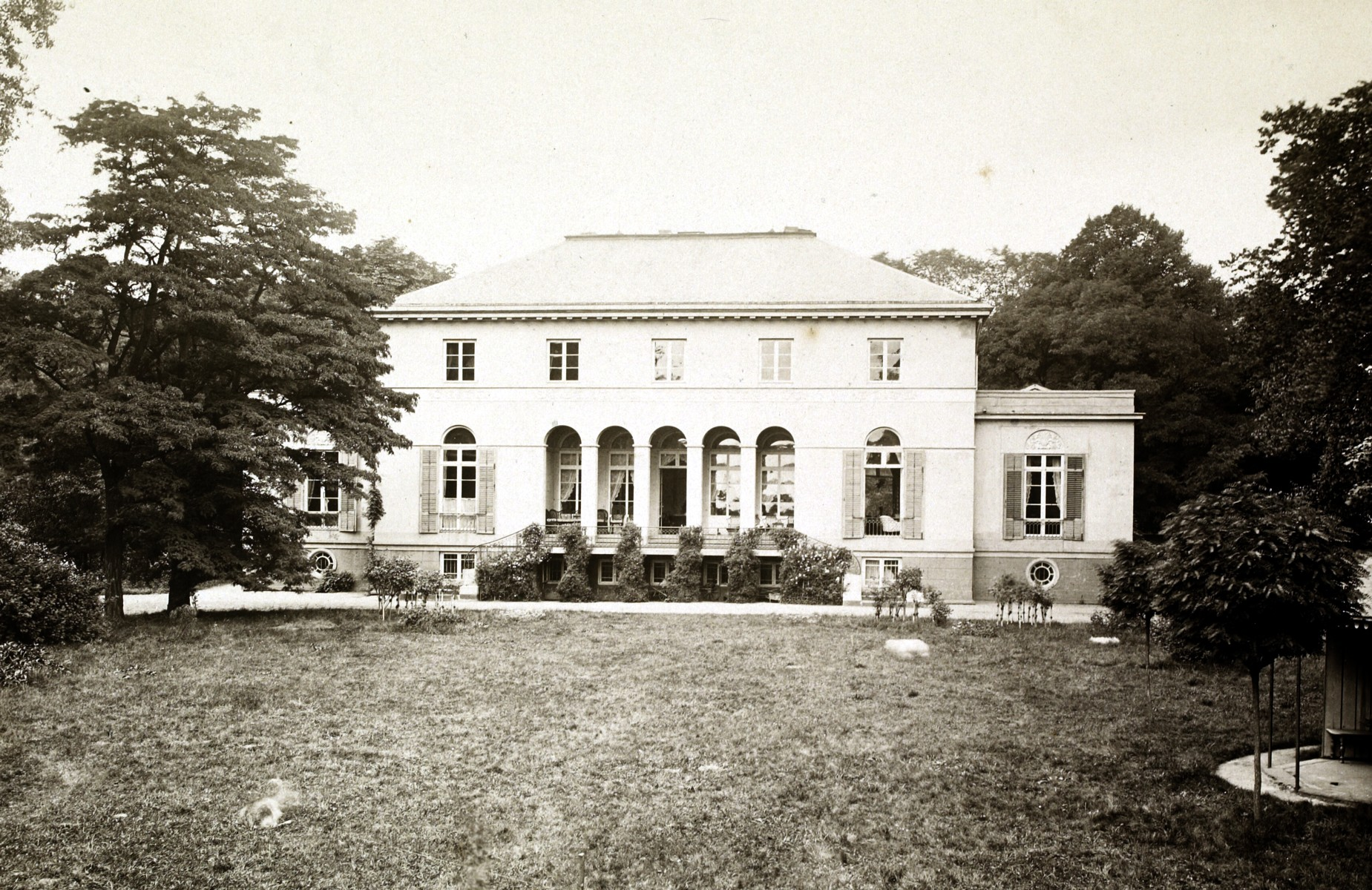 Gartenansicht des Landhauses Rücker, Hammerlandstraße 238 in Hamburg-Hamm, Ausschnitt aus